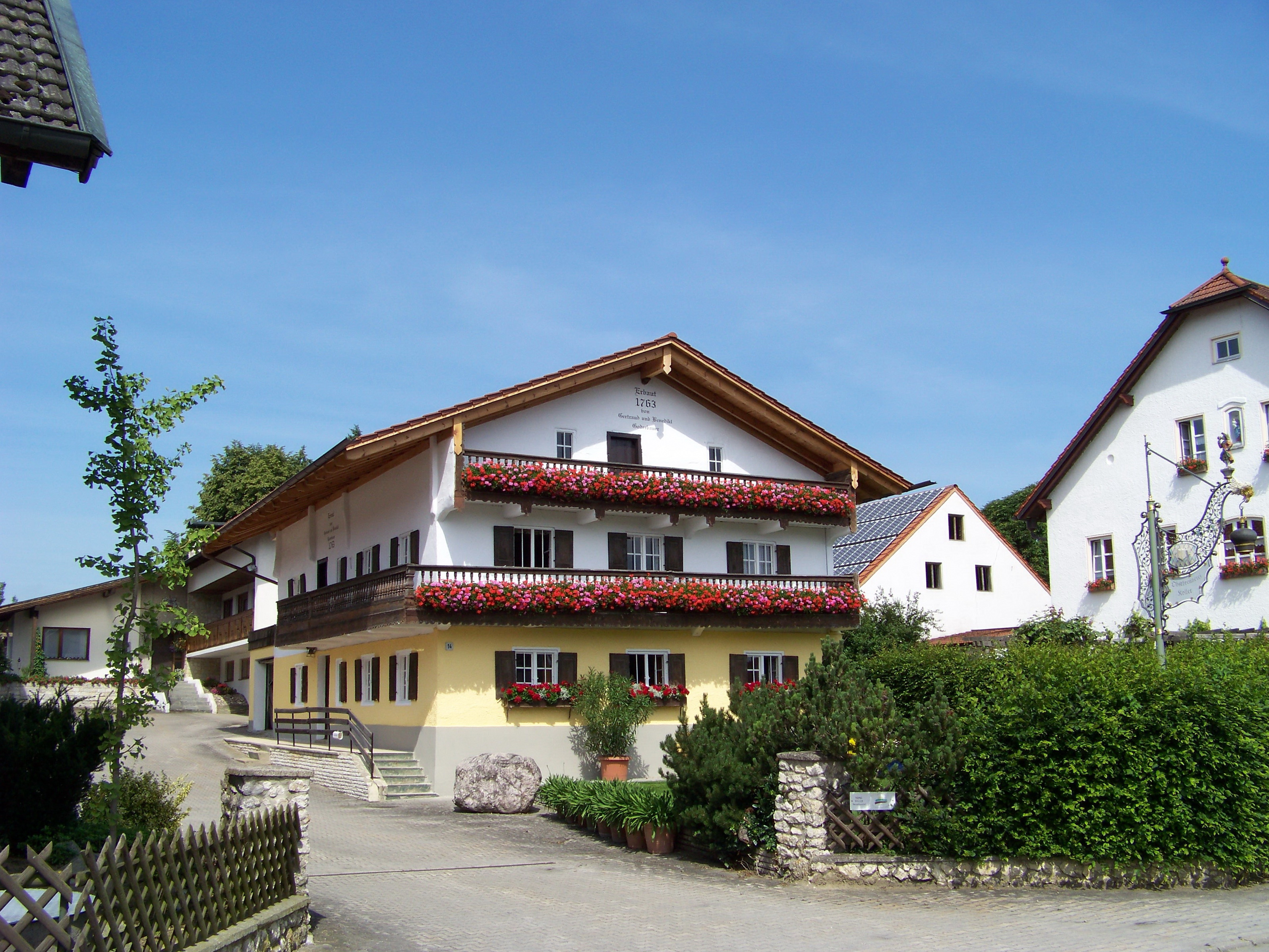 Wohnstallhaus eines Vierseithofes, mit zwei Giebelschroten, verputzter Blockbau mit Kniestock. Lt. Inschrift erbaut 1763 von Gertraud und Benedikt Goderbauer.